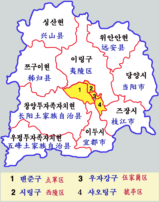 후베이성 이창시 현급구역도